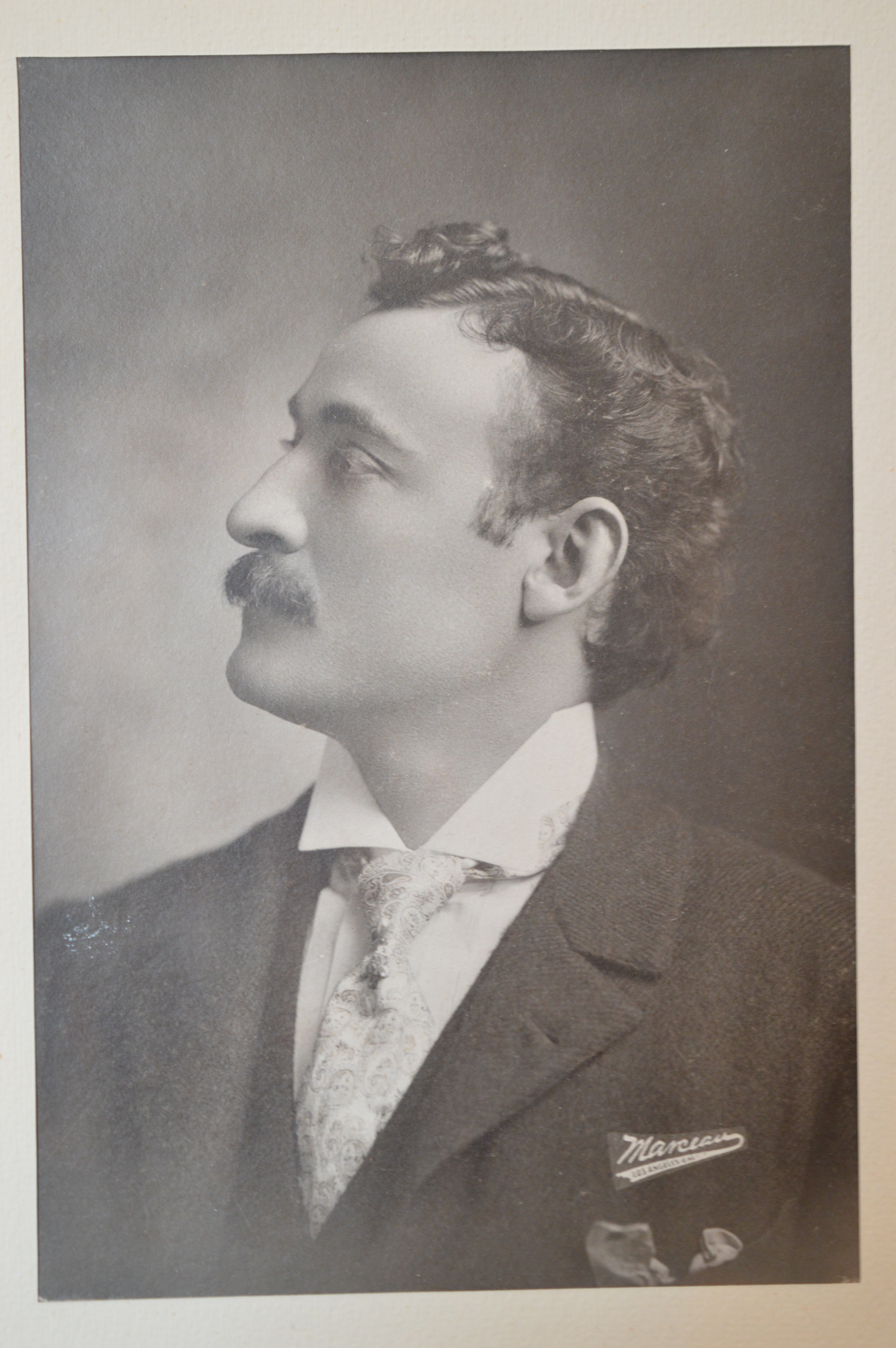 Tenore Badaracco Giovanni